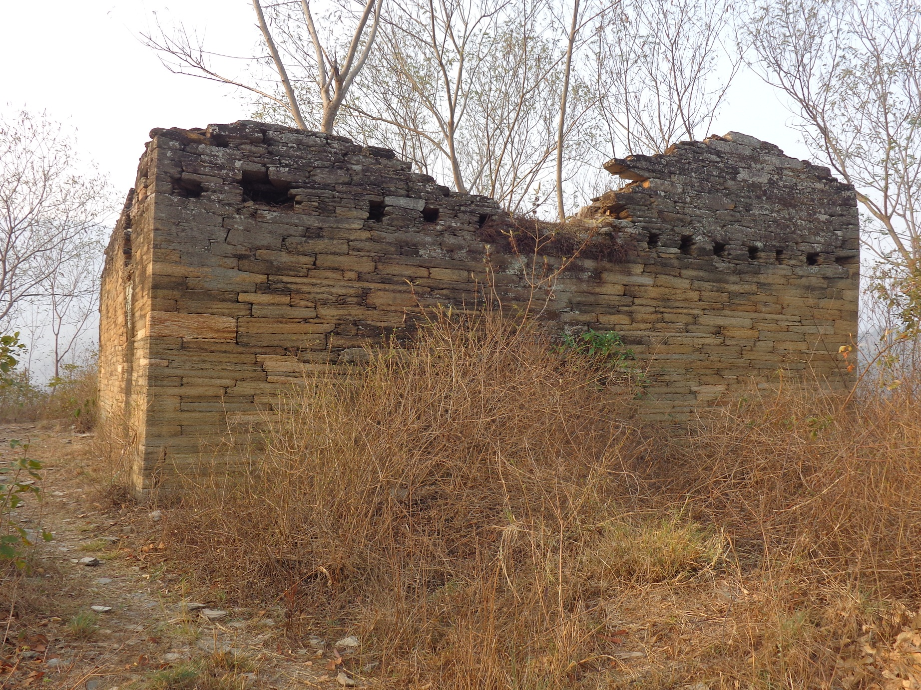 नेपाल भाषा: Doti Raikaa Raja kot-2